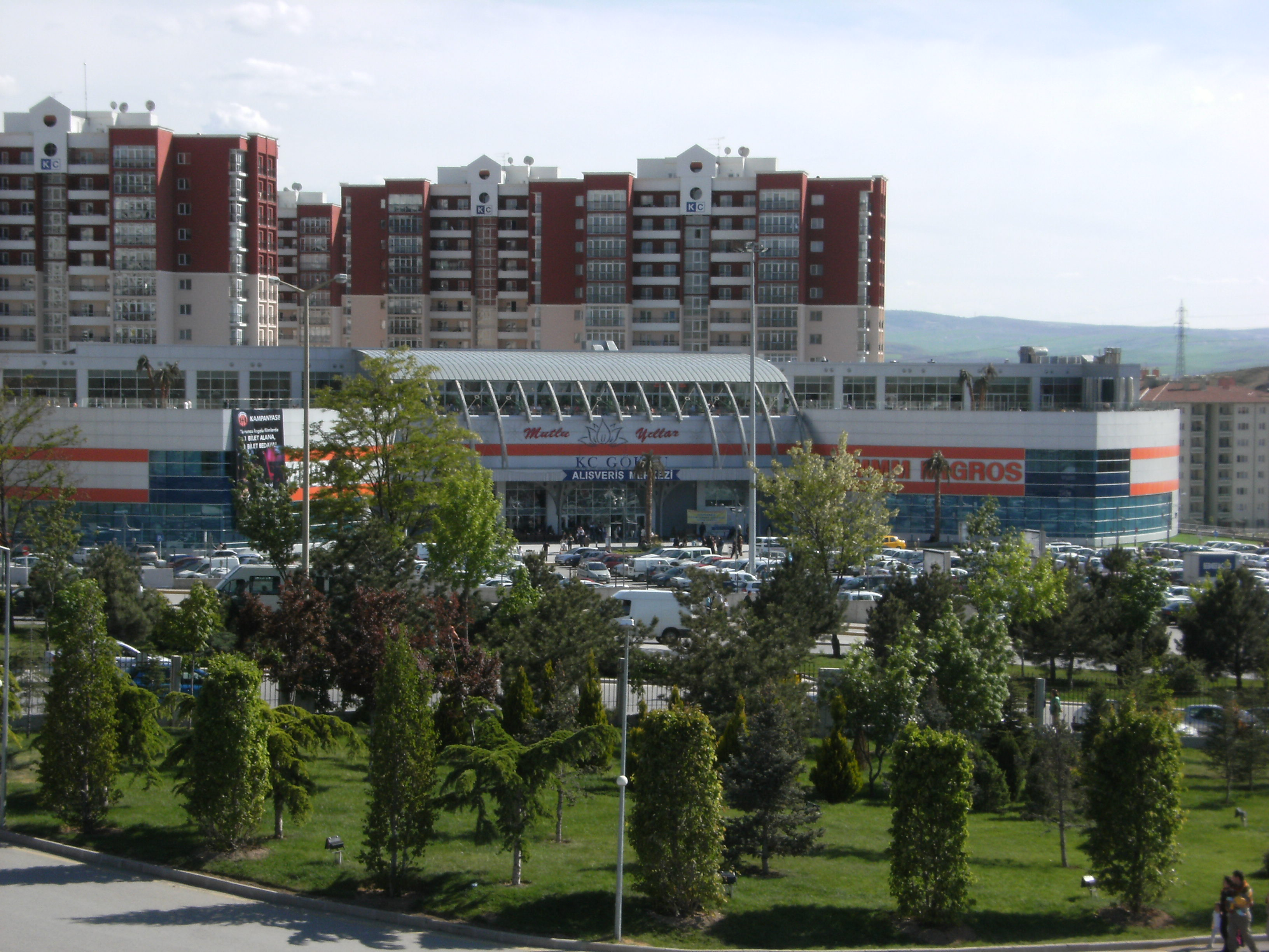 KC Göksu Alışveriş Merkezi, Eryaman, Etimesgut, Ankara, Türkiye